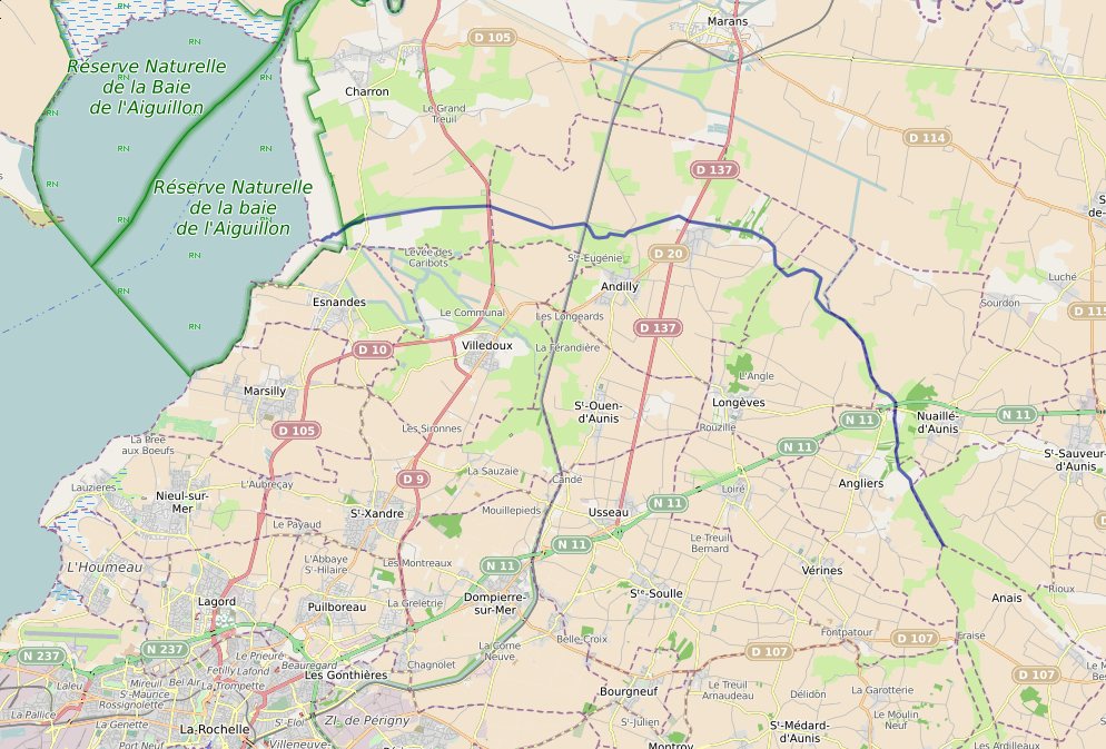 Le canal du Curé en Charente-Maritime (France).